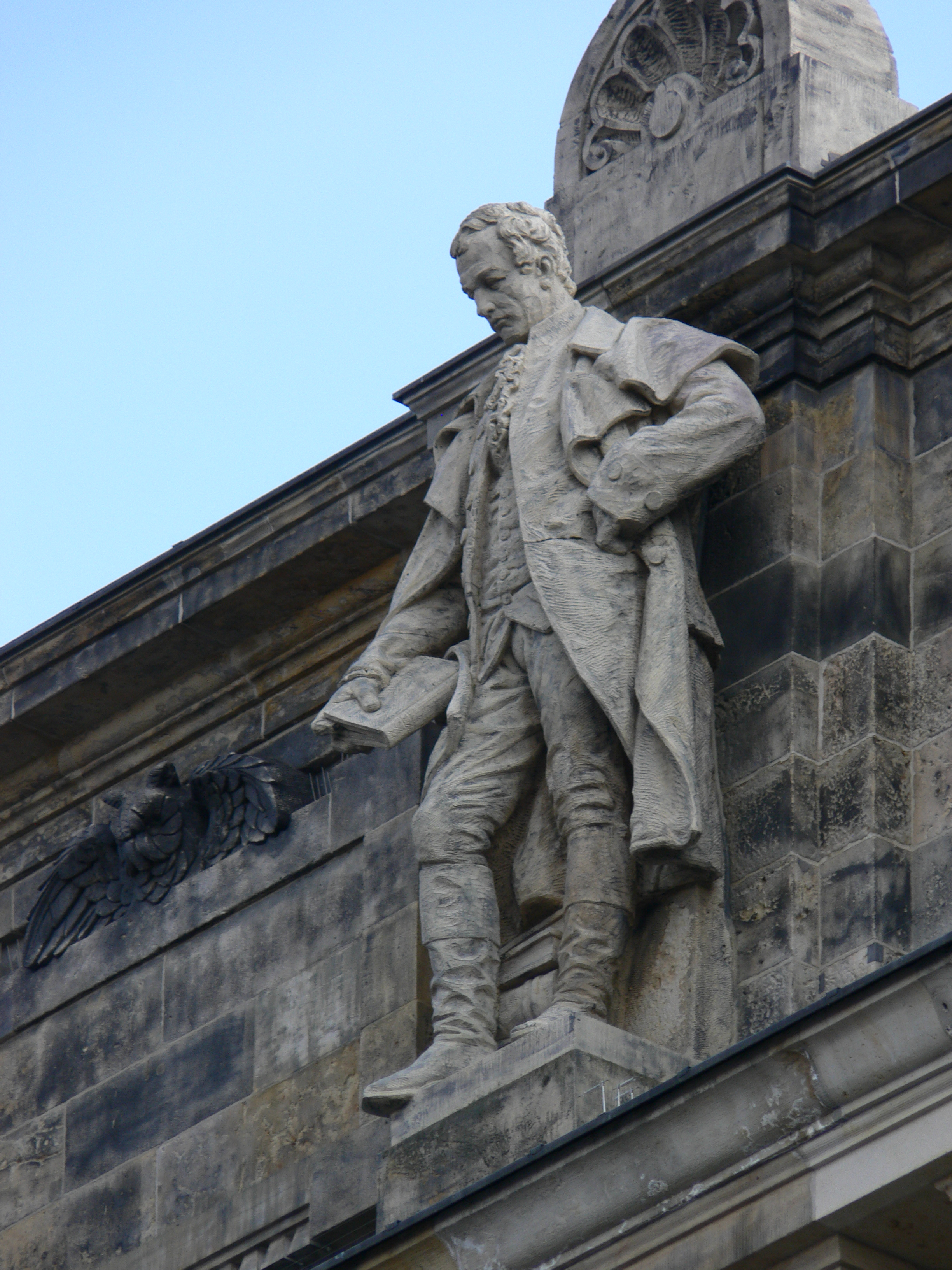 Leipzig, Reichsgerichtsgebäude Statue "Carl Gottlieb Svarez"